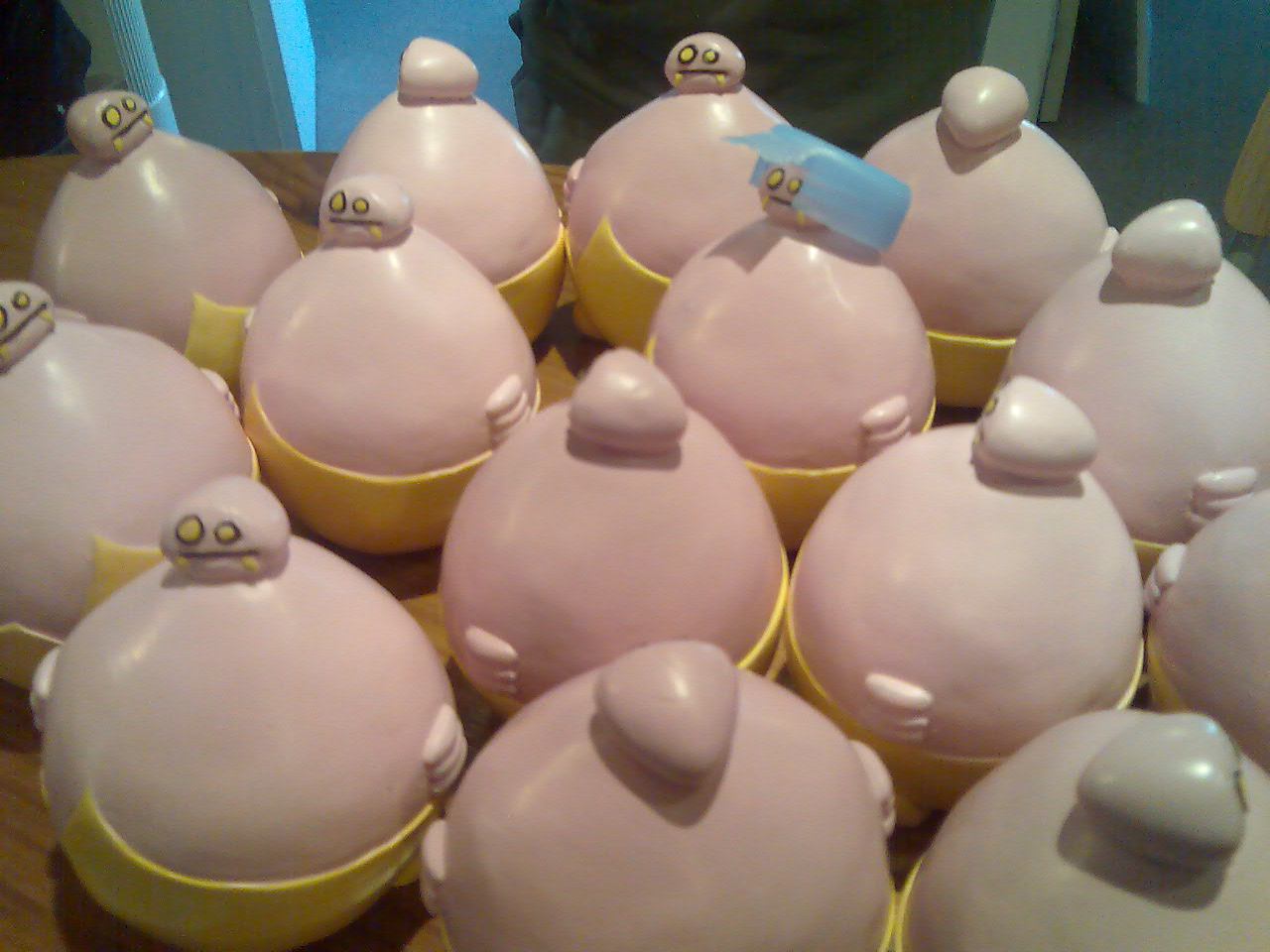 Figurines du Fat Gourg.